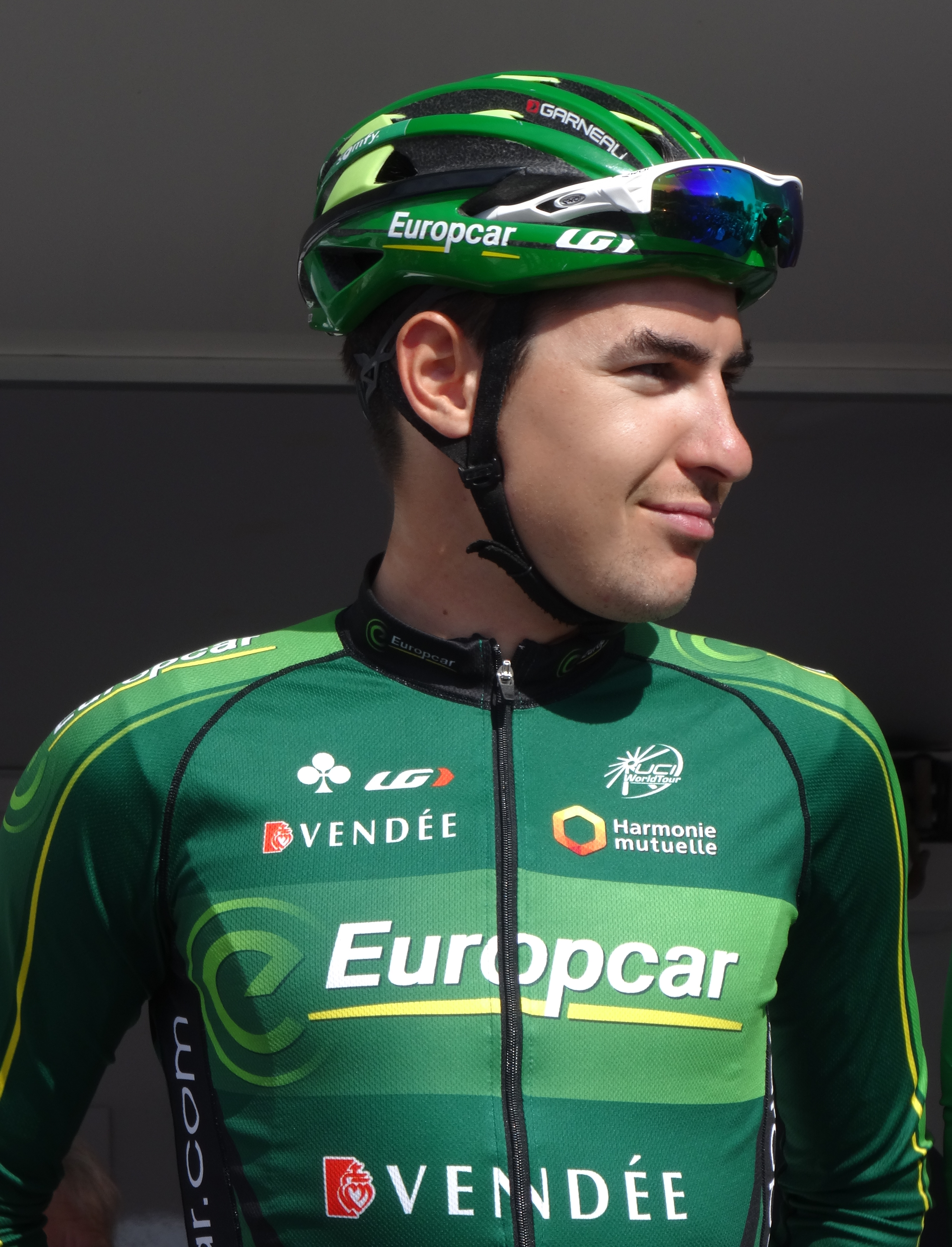 Reportage réalisé le jeudi 17 avril à l'occasion du départ et de l'arrivée du Grand Prix de Denain 2014 à Denain, Nord, Nord-Pas-de-Calais, France.